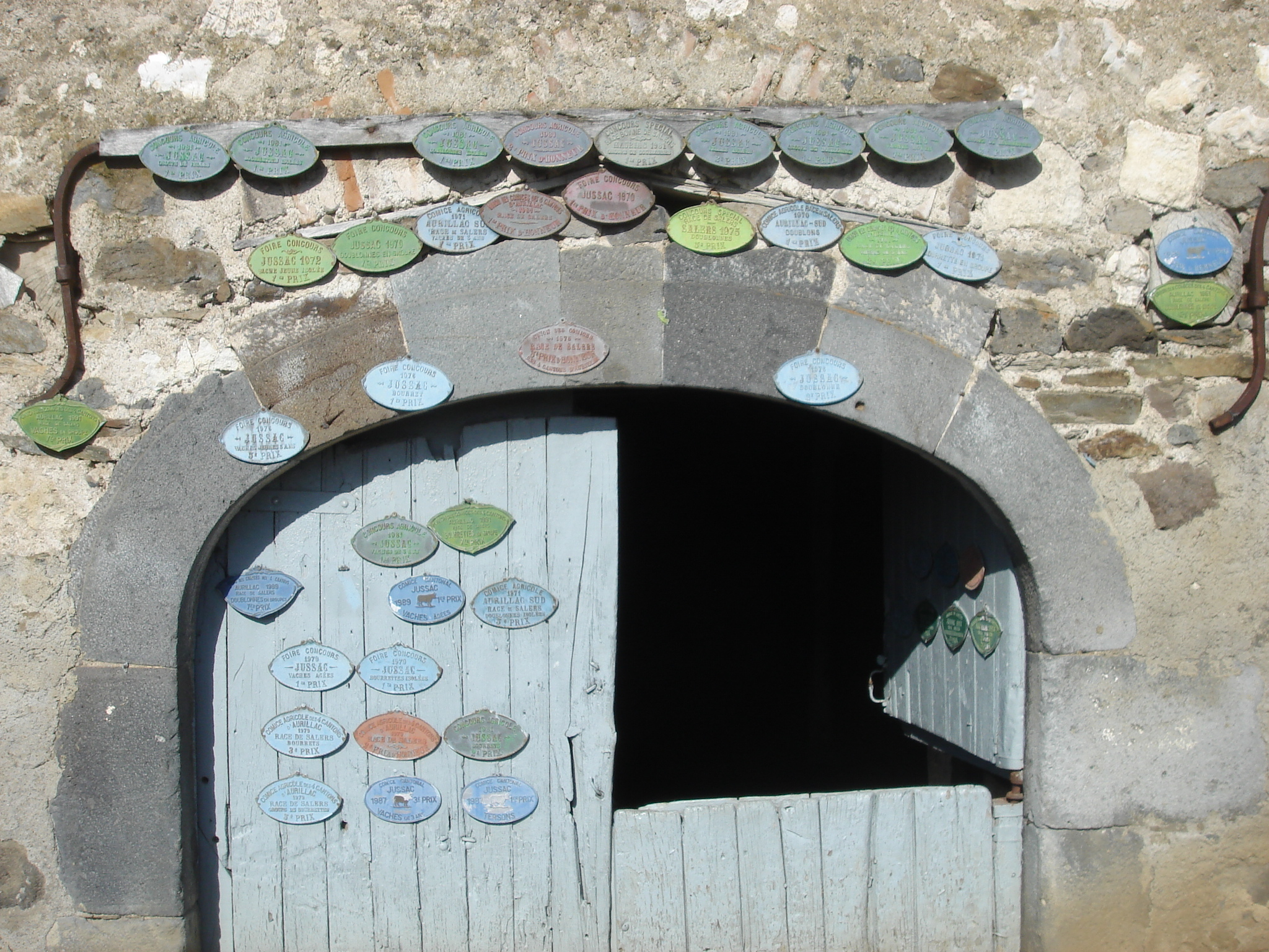 Ferme de Messac. Reilhac (15) France. Porte de l'étable, plaque de concours.